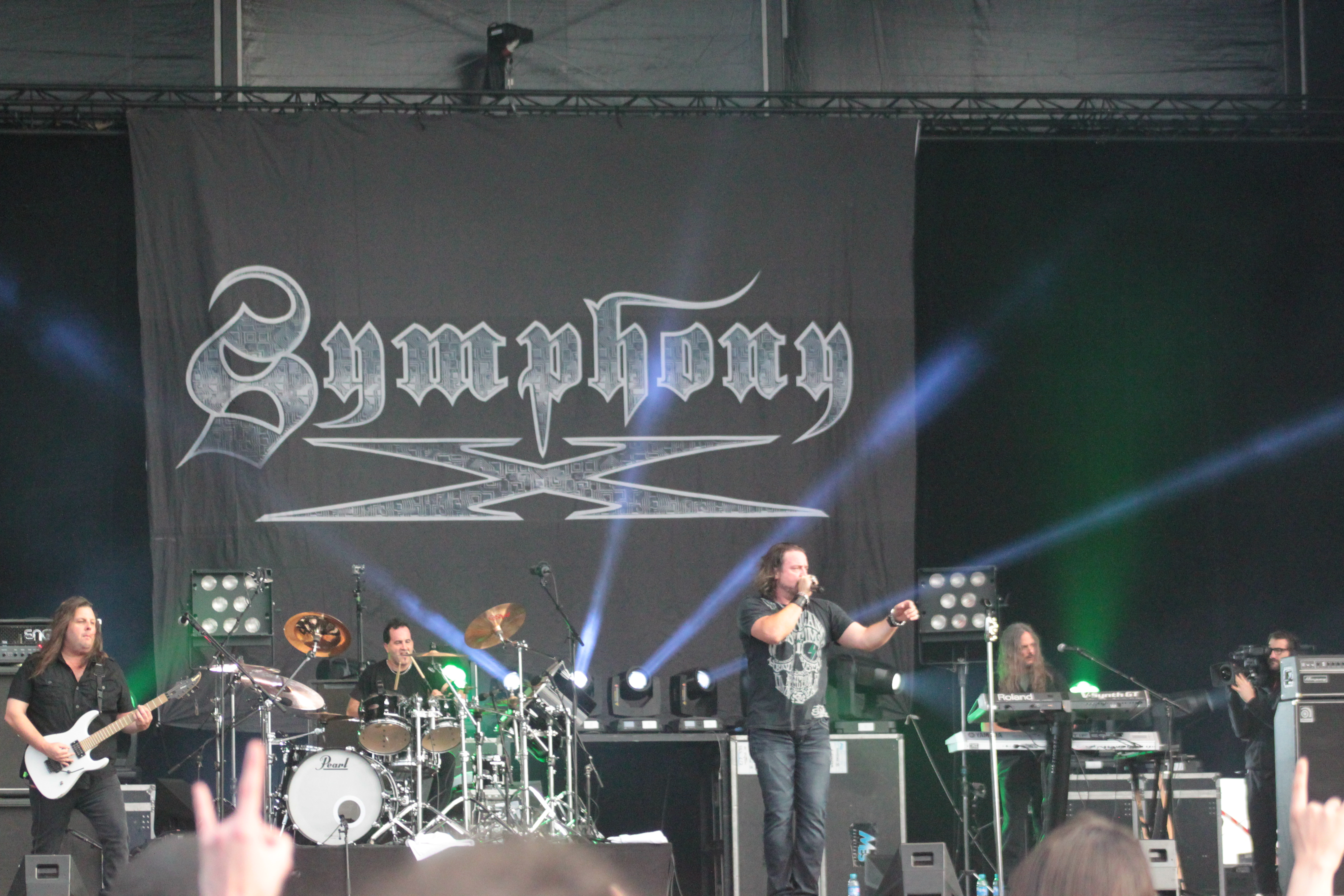 Symphony X, Hellfest 2013, Fr-44-Clisson.